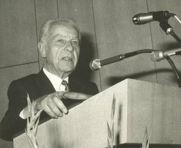 Hans Kauri